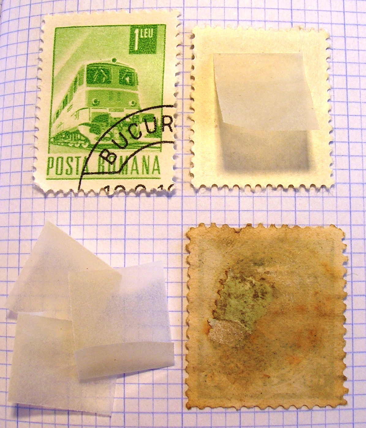 stamp hinges